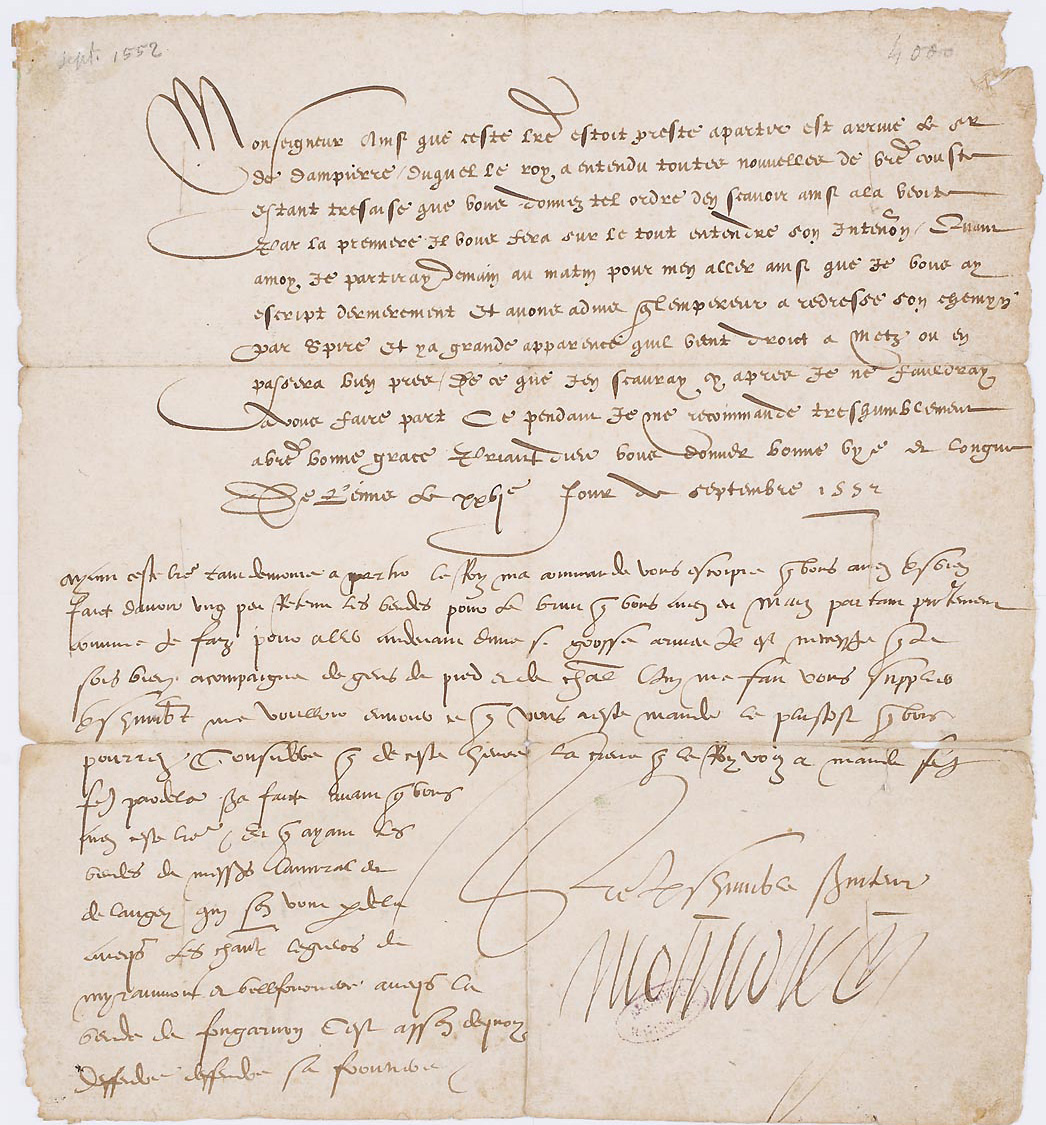 Lettre de Montmorency demandant des renforts à Antoine de Bourbon, duc de Vendôme, contre Charles Quint qui se prépare à attaquer Metz, 26 septembre 1552